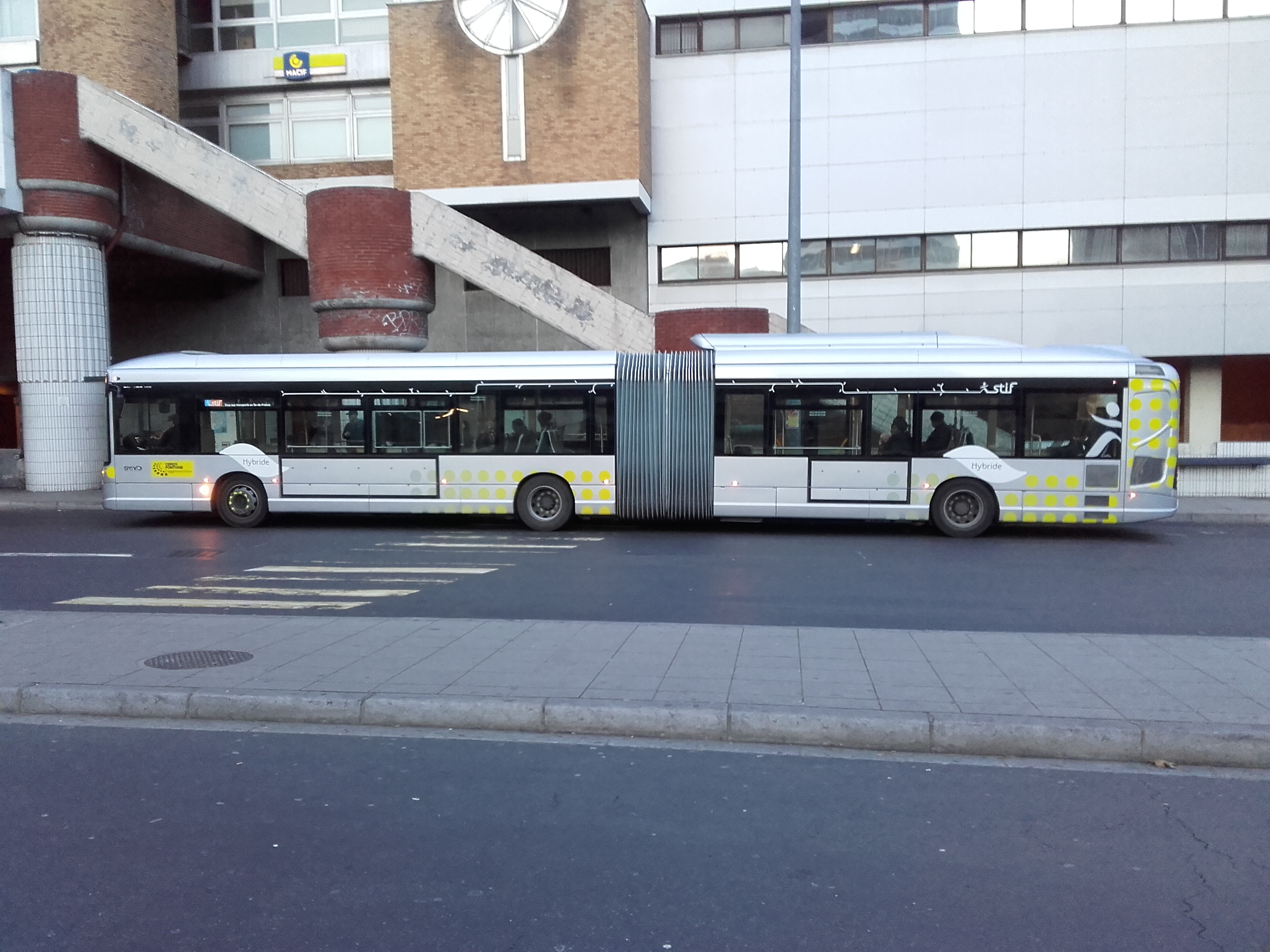 Heuliez GX 437 hybride en gare routière de Cergy-Préfecture